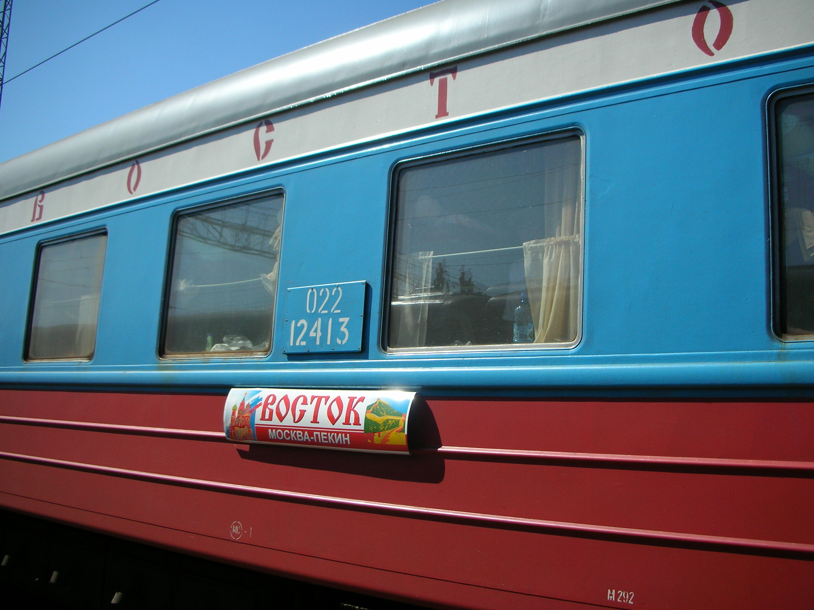 莫斯科-北京19/20次列车2008年以前所使用的车体及水牌